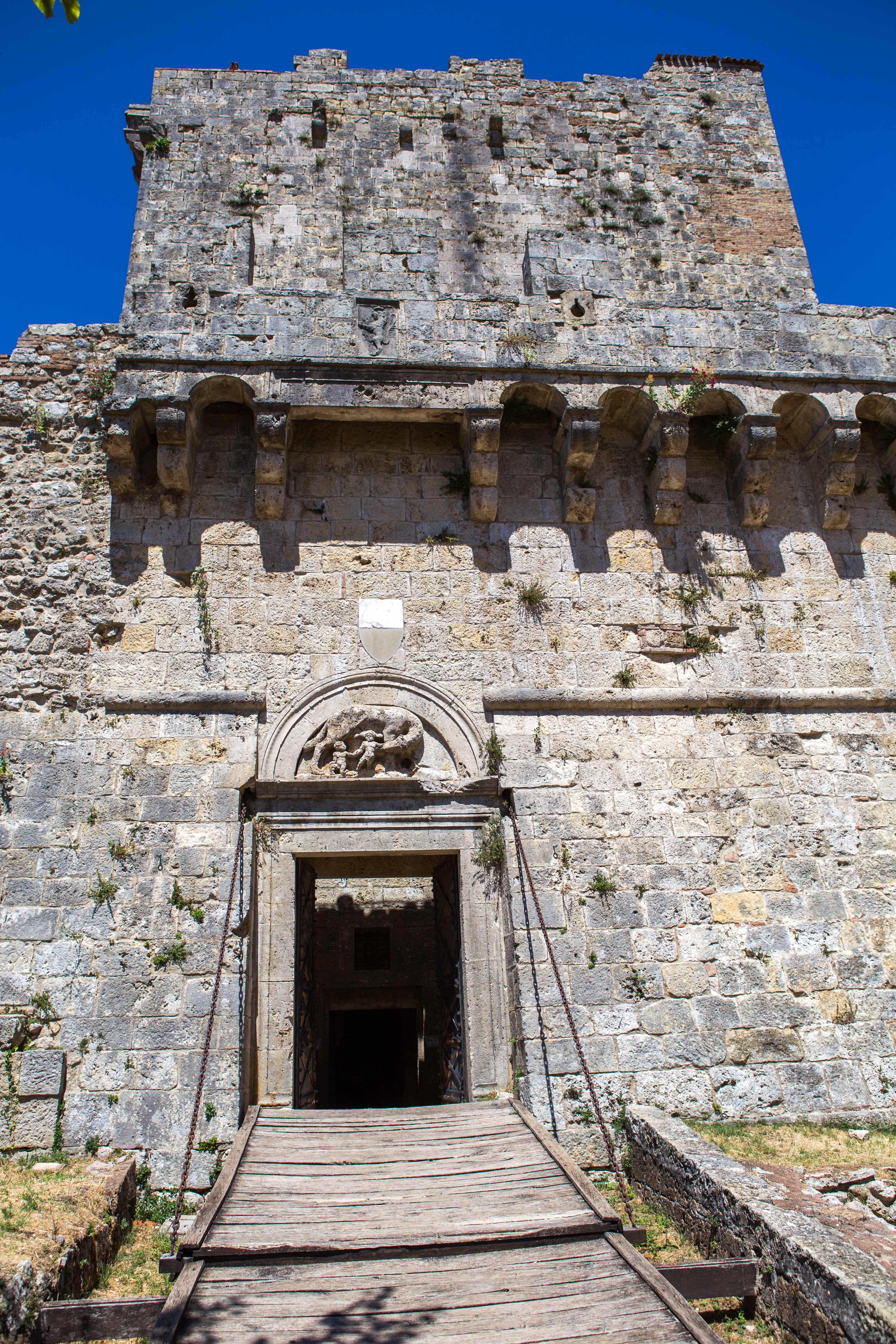 Castello di Sarteano This is a photo of a monument which is part of cultural heritage of Italy.